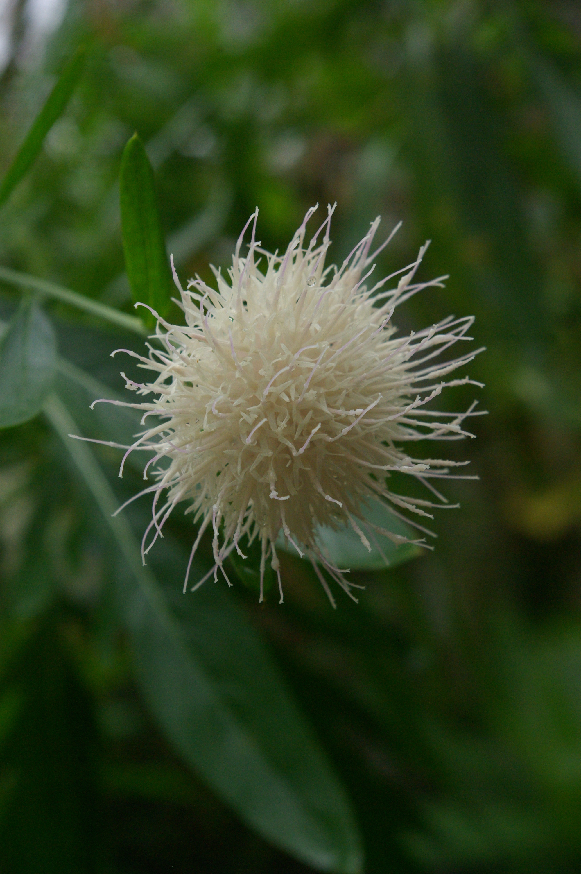 User:El Funcionario Cheirolophus tagananensis, photo prise au Conservatoire national de botanique de Brest à l'occasion du "Wiki takes Conservatoire Botanique National de Brest"